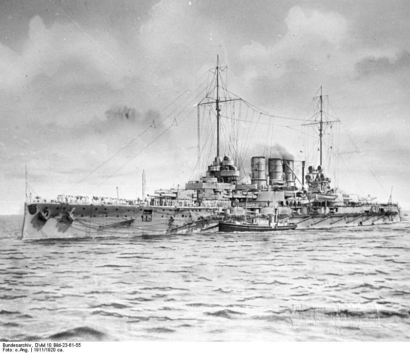 Linienschiff "SMS Ostfriesland" Linienschiff der Helgoland-Klasse "S.M.S. Ostfriesland" auf See, Ansicht der Backbord-Seite